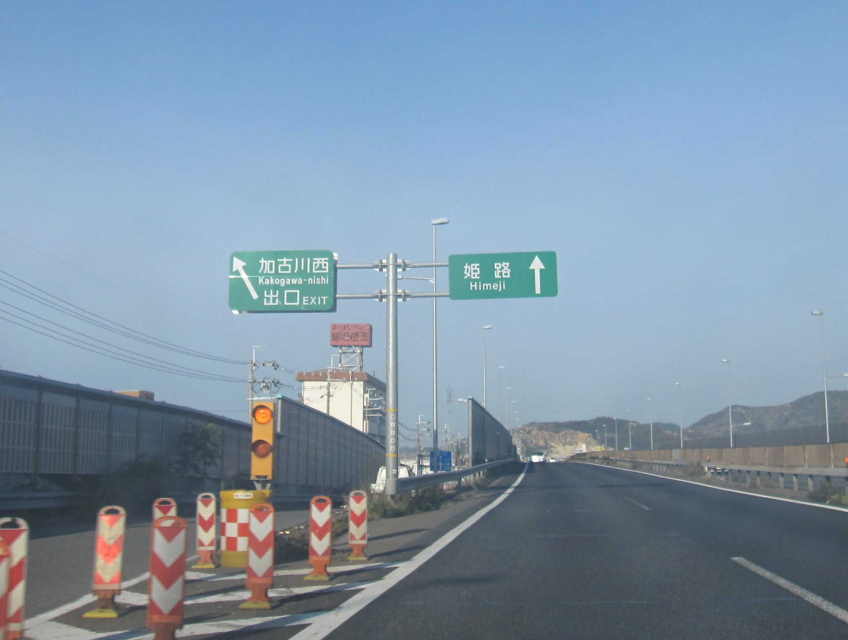 加古川西ランプ案内板